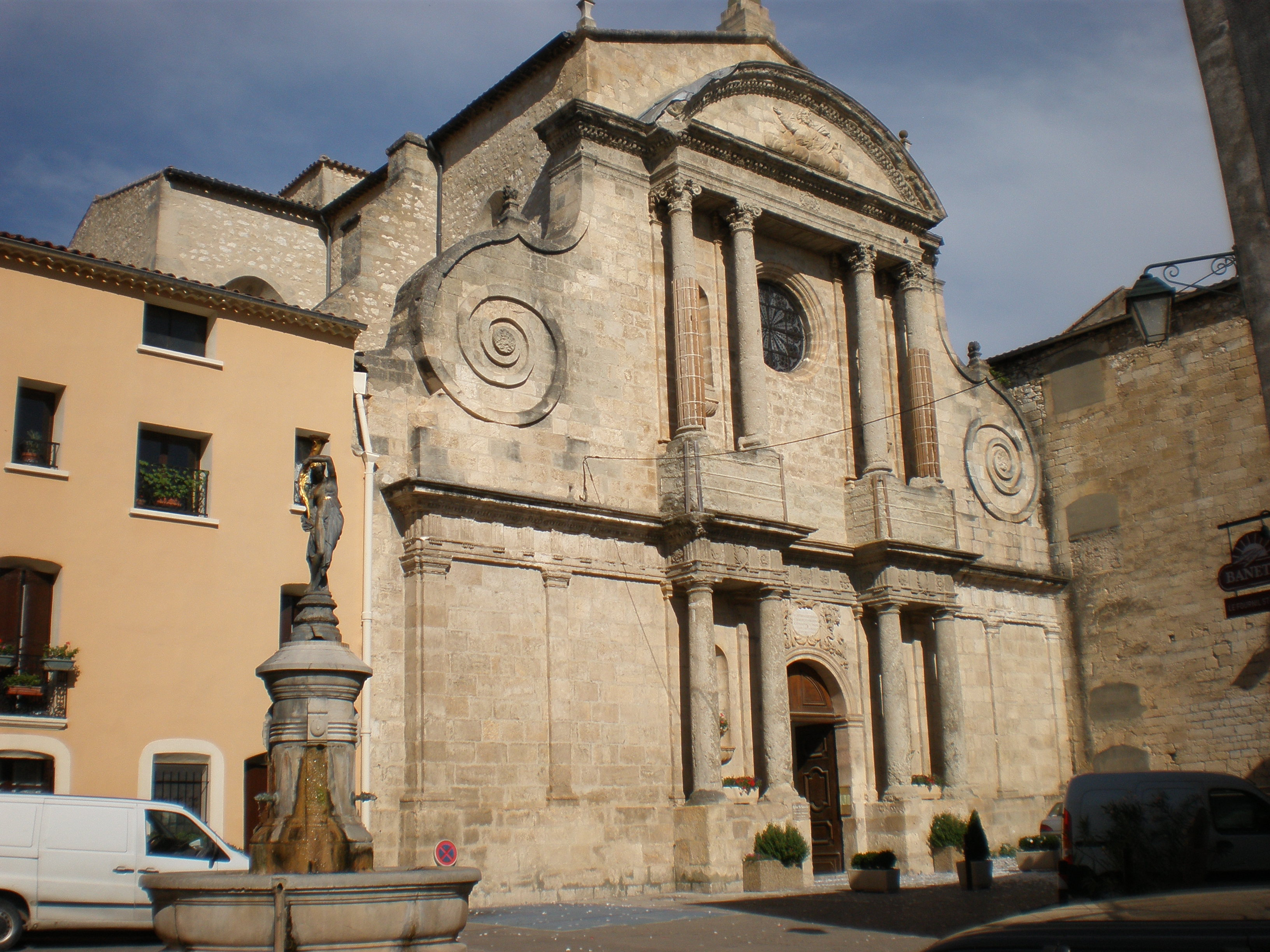 Església de Sant Salvador d'Anhana